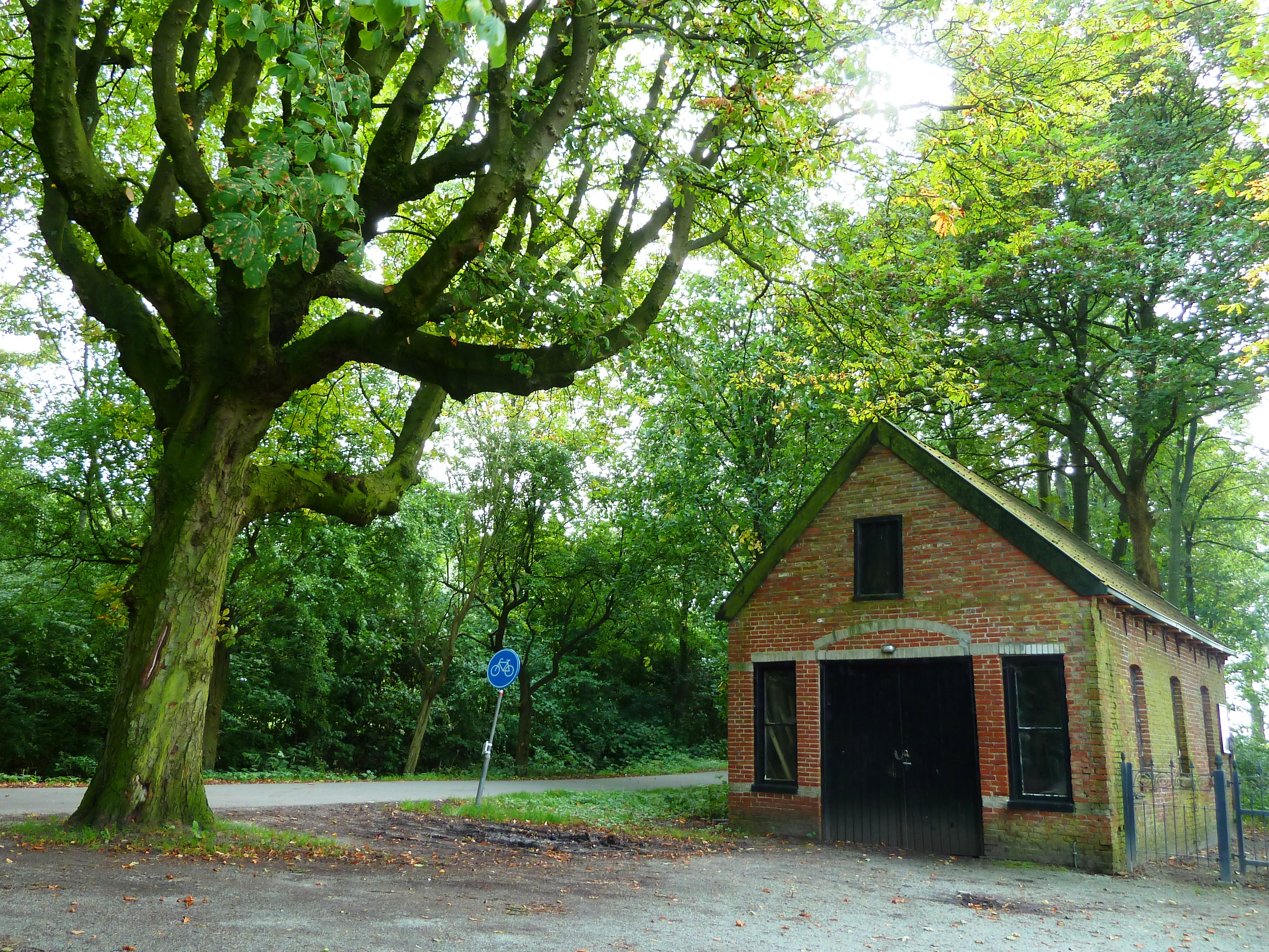 Het verenigingsgebouwtje bij de Kerk van Breede.